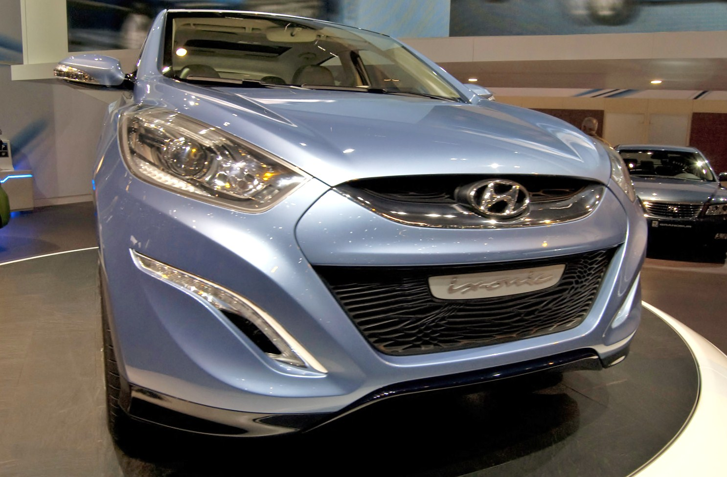 Hyundai ixOnic Concept en el Salón de Ginebra 2009.